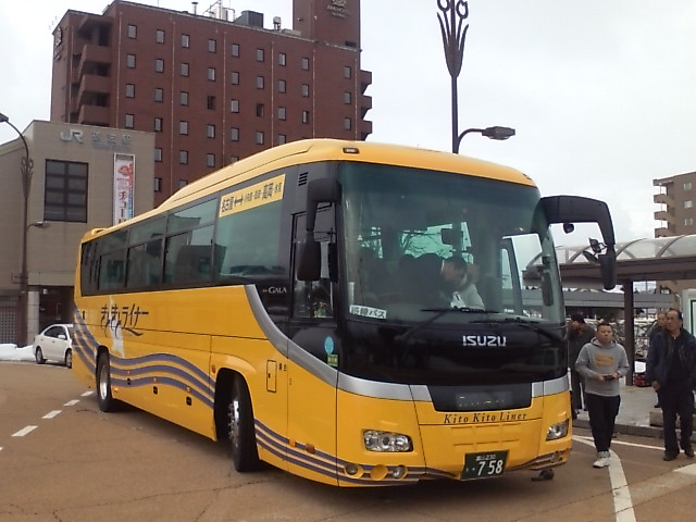 砺波駅南バス停で乗車扱い中のイルカ交通・きときとライナー